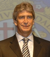 Manuel Luis Pellegrini Ripamonti (Santiago, Chile, 16 de septiembre de 1953), es un entrenador y ex-futbolista chileno. Jugaba de defensa central en la Universidad de Chile. Es el único entrenador chileno que ha ganado un título internacional oficial con un club de su país, la Copa Interamericana 1994 con Universidad Católica. Actualmente es el entrenador del Real Madrid CF de España. En 1979 se tituló de Ingeniero Civil, Mención Construcción de la Pontificia Universidad Catolica de Chile.